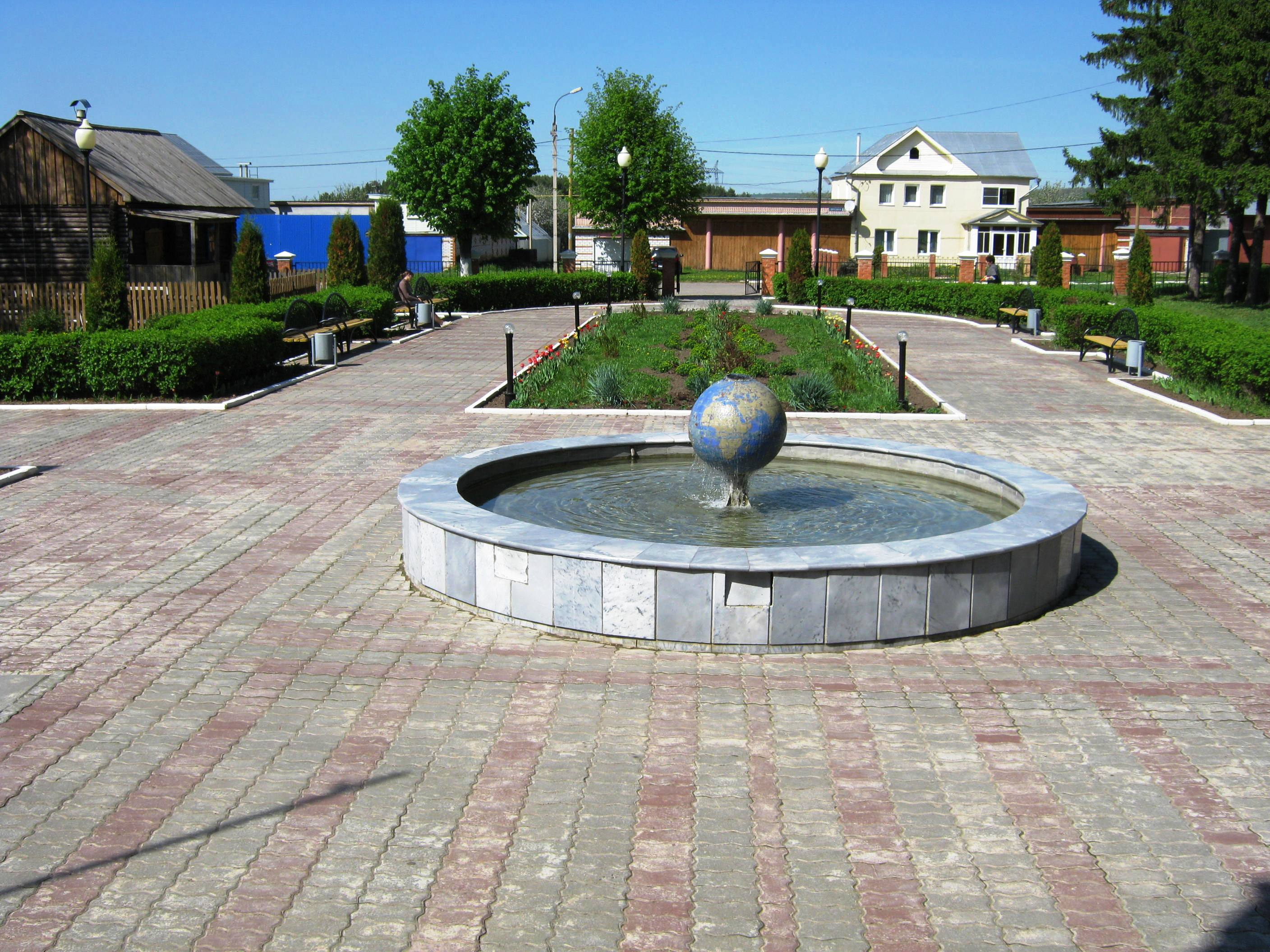 Сквер у музея космонавтики в Шоршелах